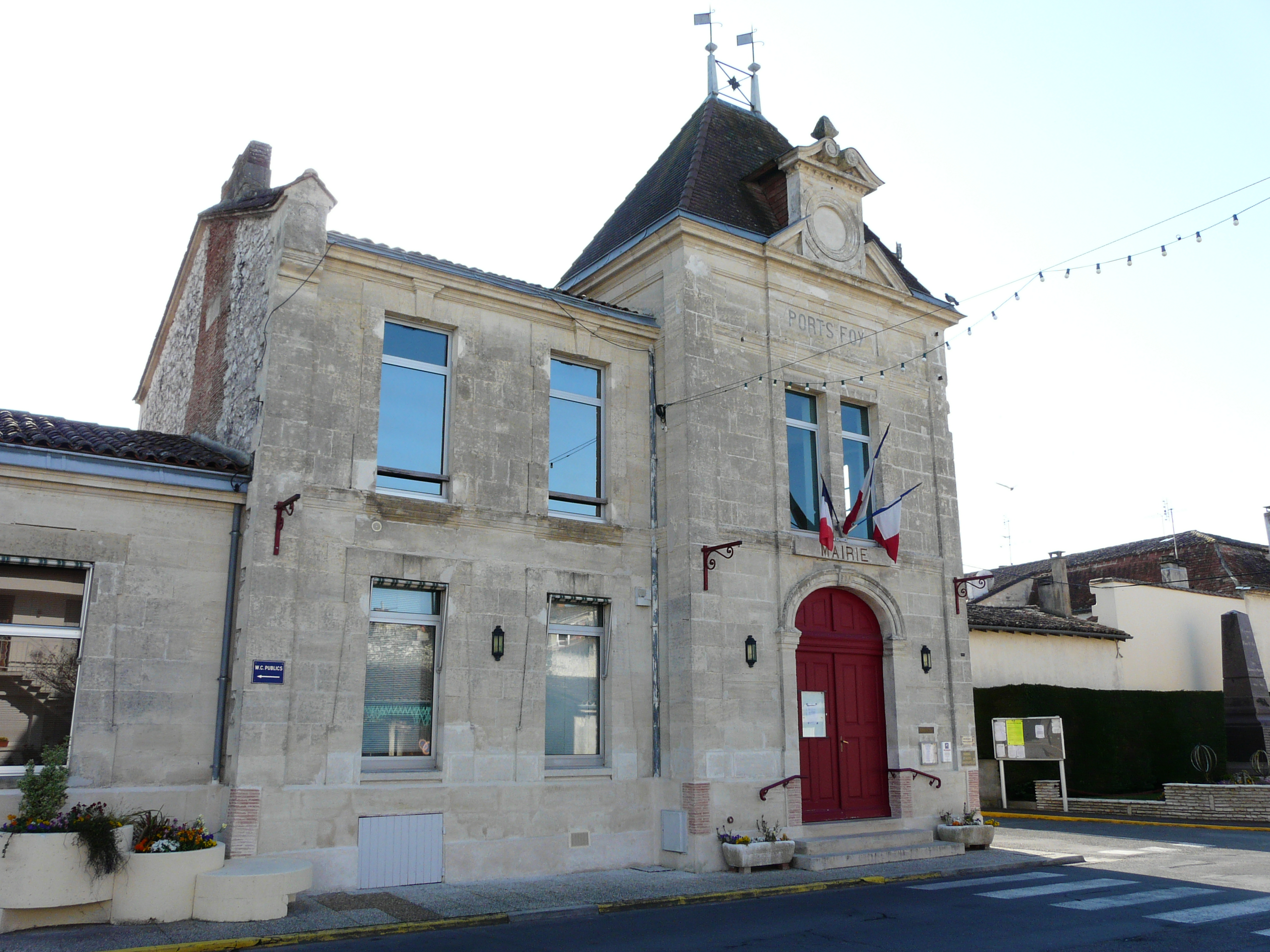 La mairie de Port-Sainte-Foy, Port-Sainte-Foy-et-Ponchapt, Dordogne, France.